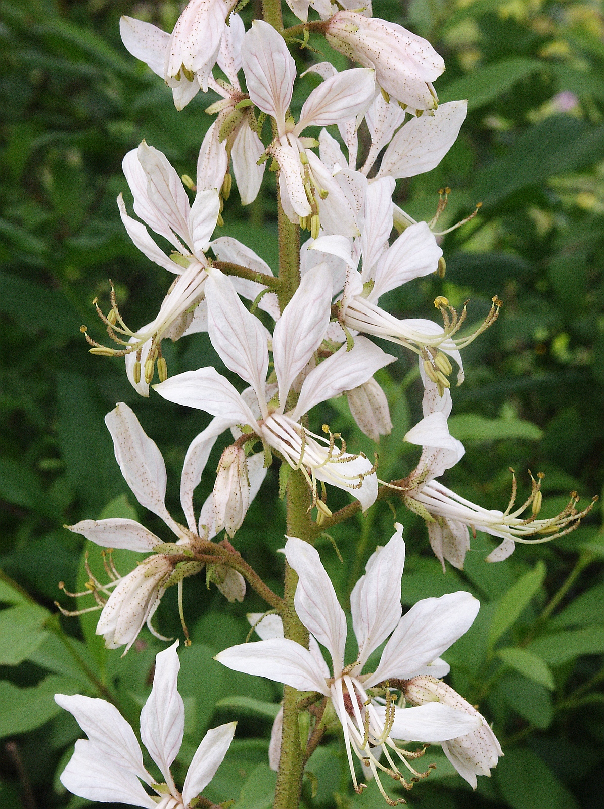 Dictamnus albus, Tauberland, Germany